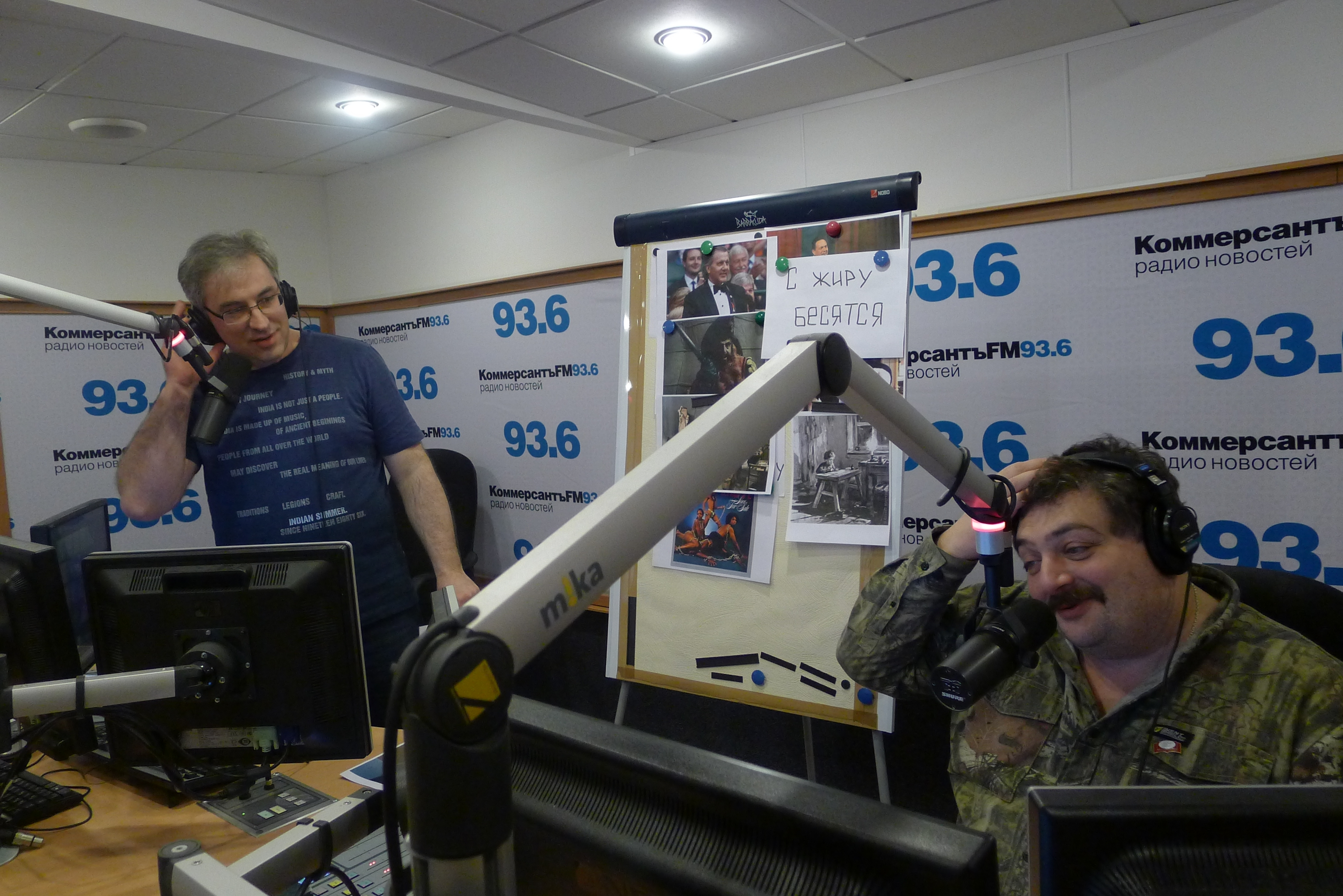 Андрей Норкин и Дмитрий Быков в студии "Коммерсантъ FM"